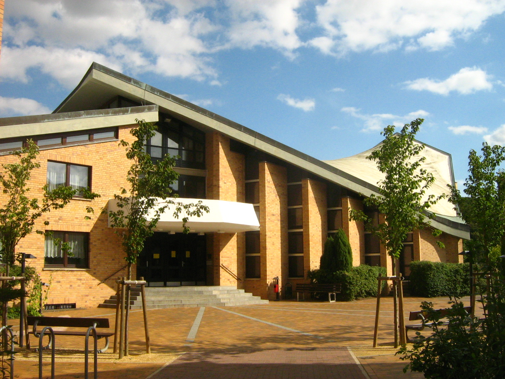 Die Kirche der katholischen Pfarrgemeinde St. Josef - St. Lukas in Neubrandenburg, 1980 geweiht.